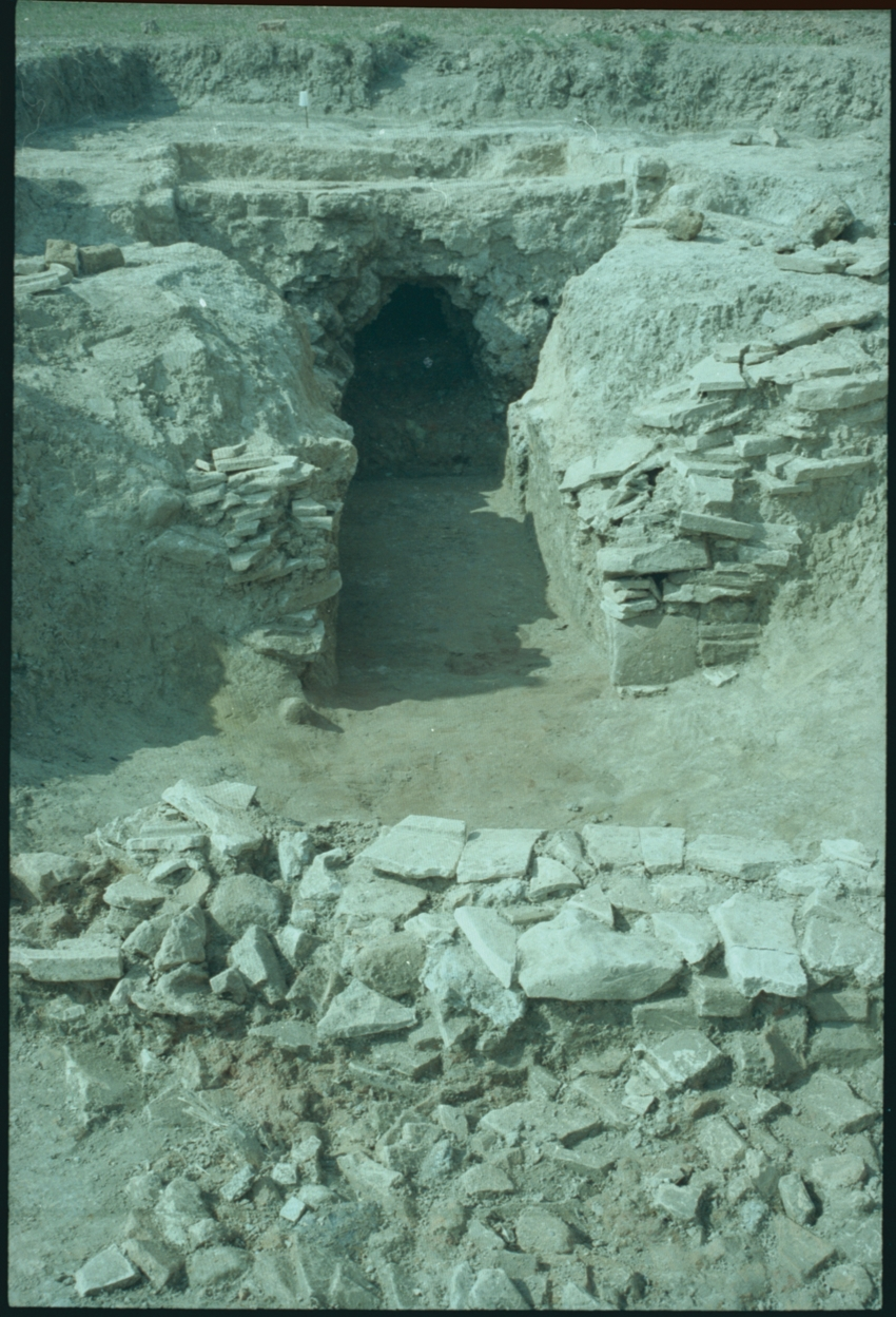 Il fronte della fornace di Cortogno